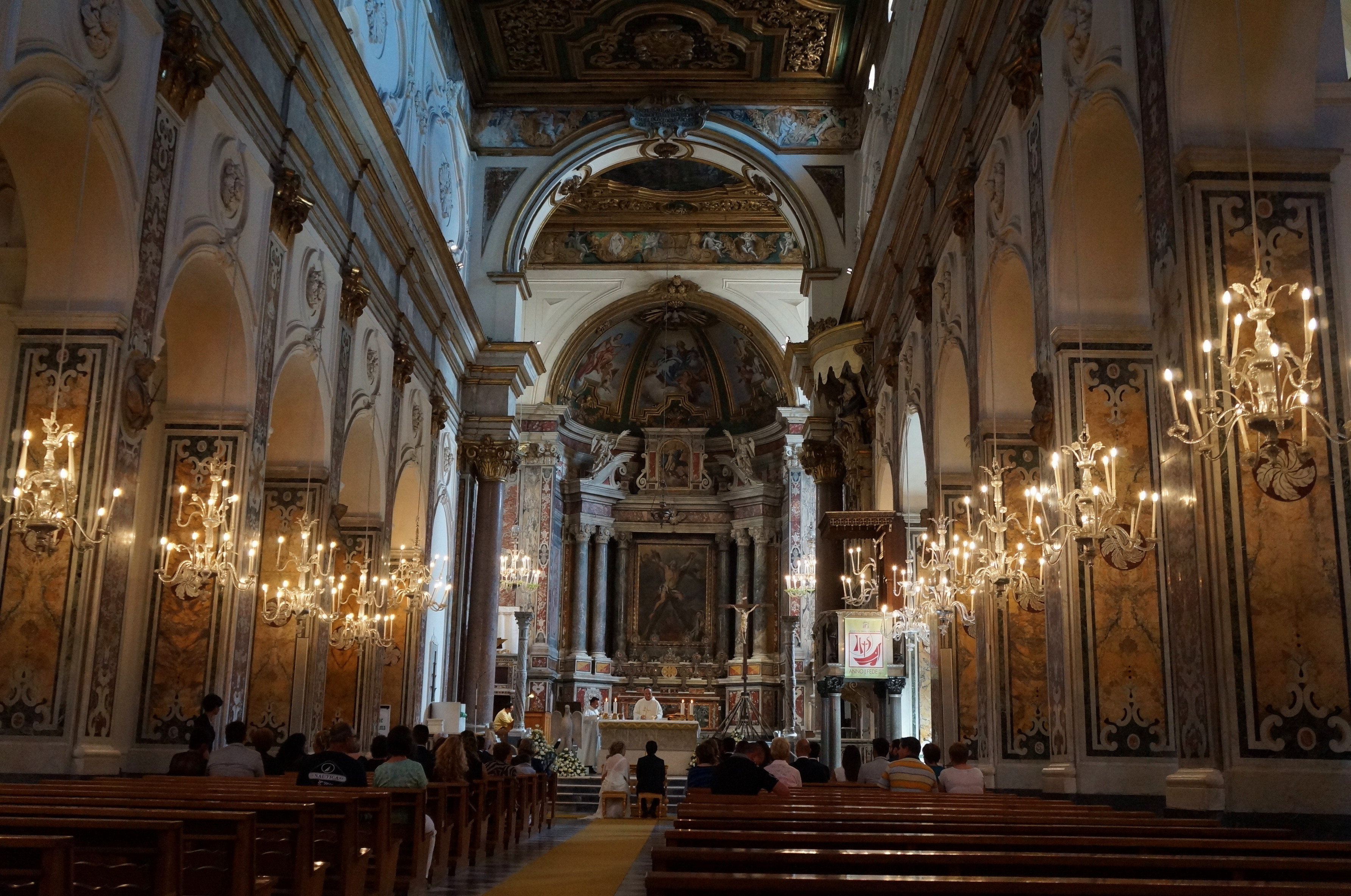 Matrimonio nel Duomo di Amalfi (SA), Italia.